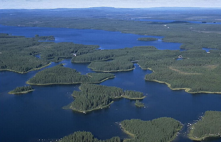 Motiv: Lövön Nyckelord: Flygbilder, Riksintressen Kategori: Insjömiljöer Lövön